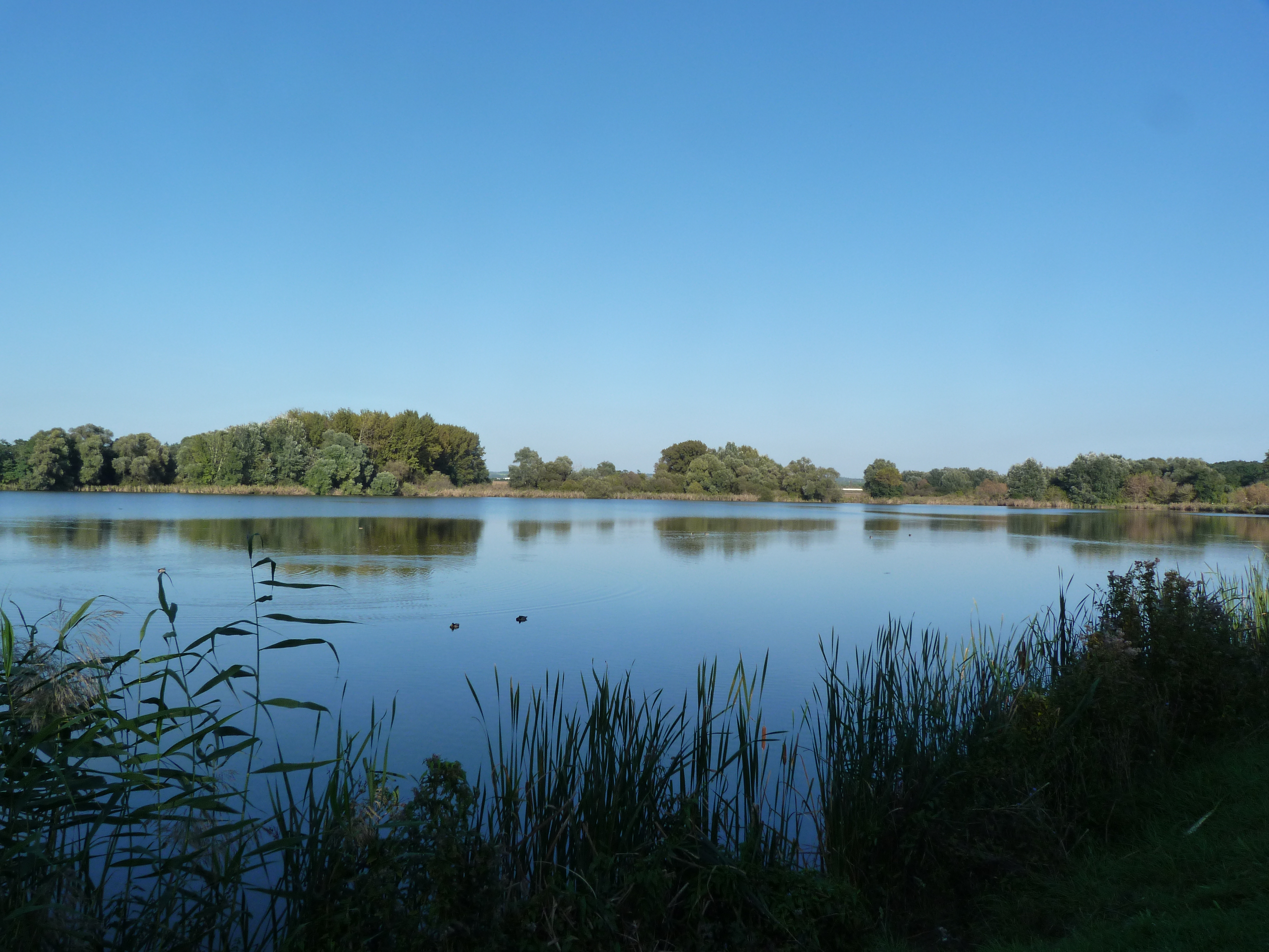 A felvétel 2014. szeptember 28-án, vasárnap készült Budapesten, a Naplás tónál (XVI. kerület).